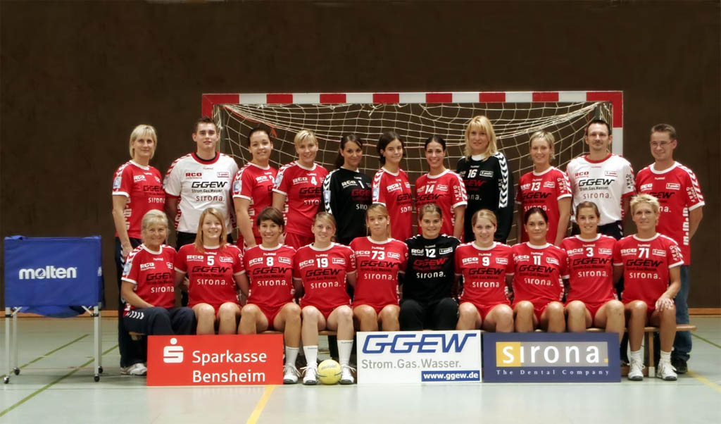 offizielles Mannschaftsfoto der 1. Frauenmannschaft der HSG Bensheim/Auerbach der Saison 2006/2007 aufgenommen am 2. September 2006 in der Bensheimer Weststadthalle